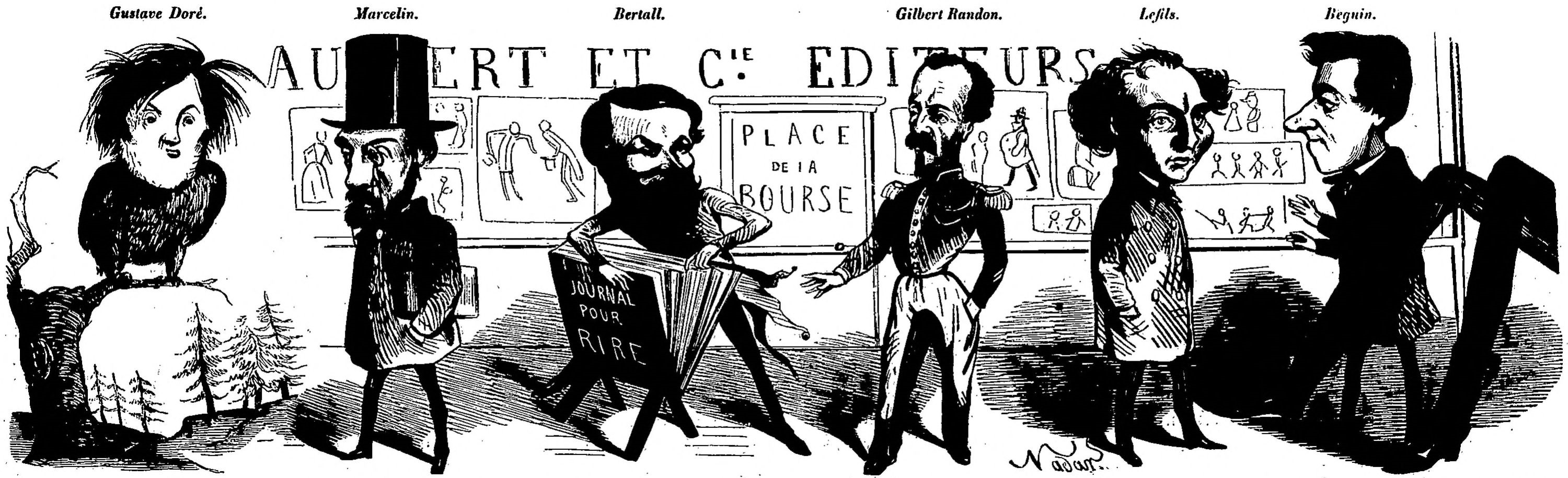 Caricatures des dessinateurs du Journal pour rire par Nadar.